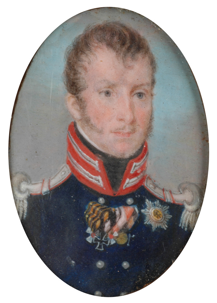 Miniaturporträt von Friedrich Wilhelm III, König von Preußen